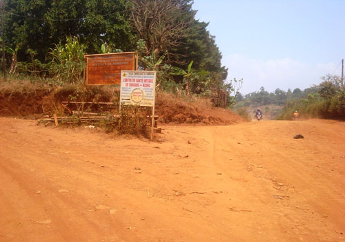 Routes poussiéreuse de Bangang, carrefour Nzong